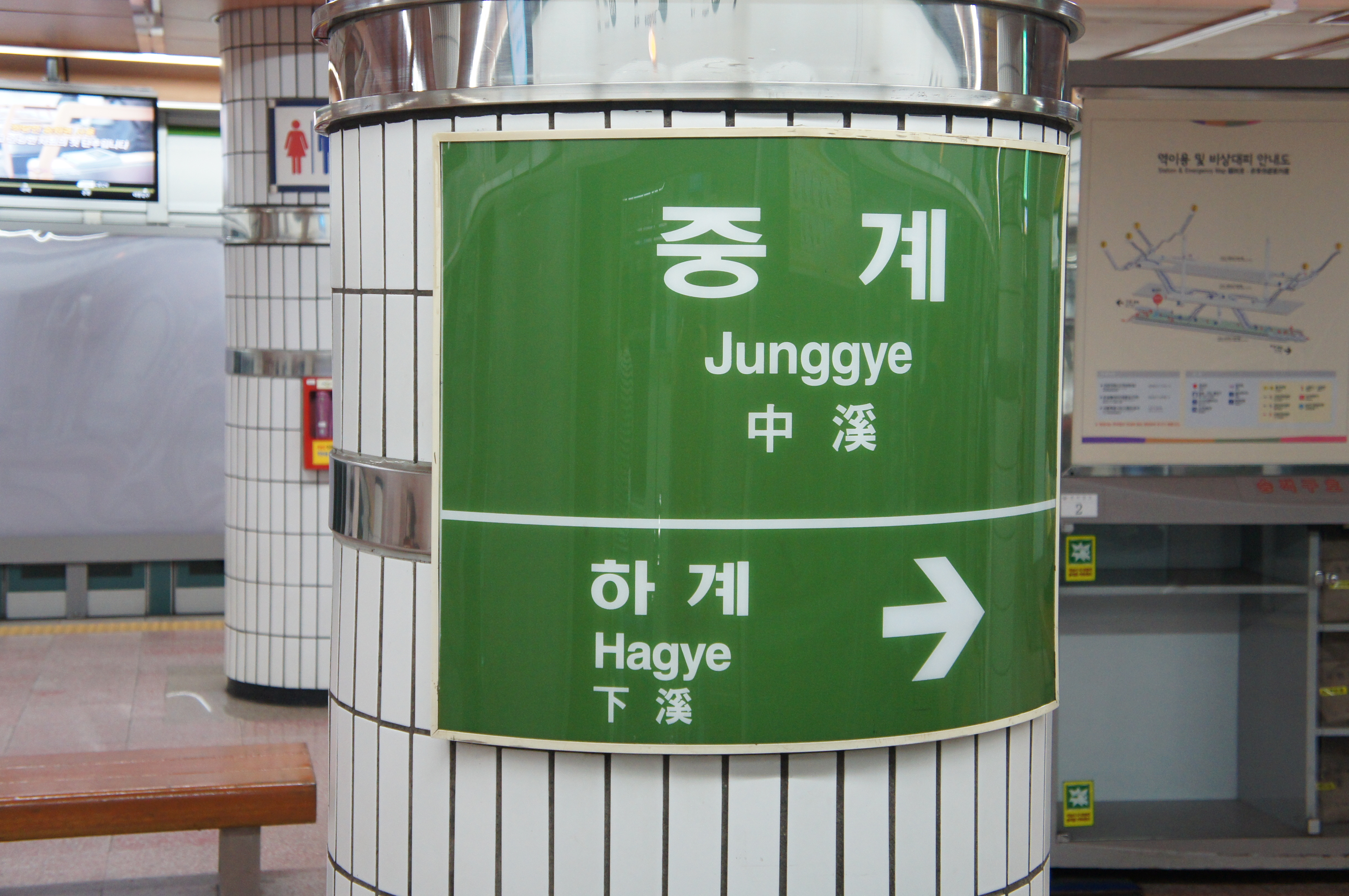 중계역 역명판